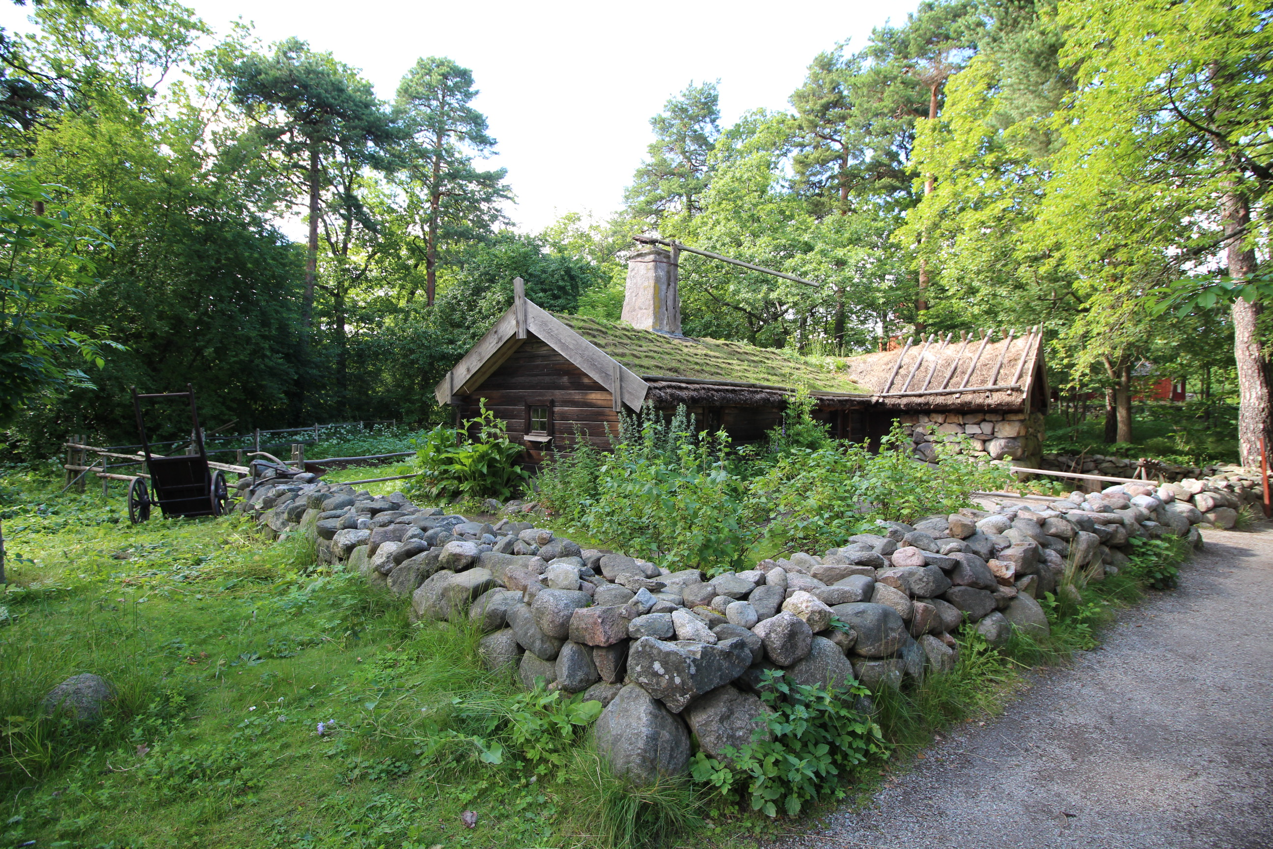 Hornborgastugan på Skansen.